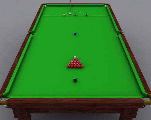 Still from Media:Snooker break.ogg